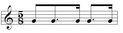 Cellule Zortziko